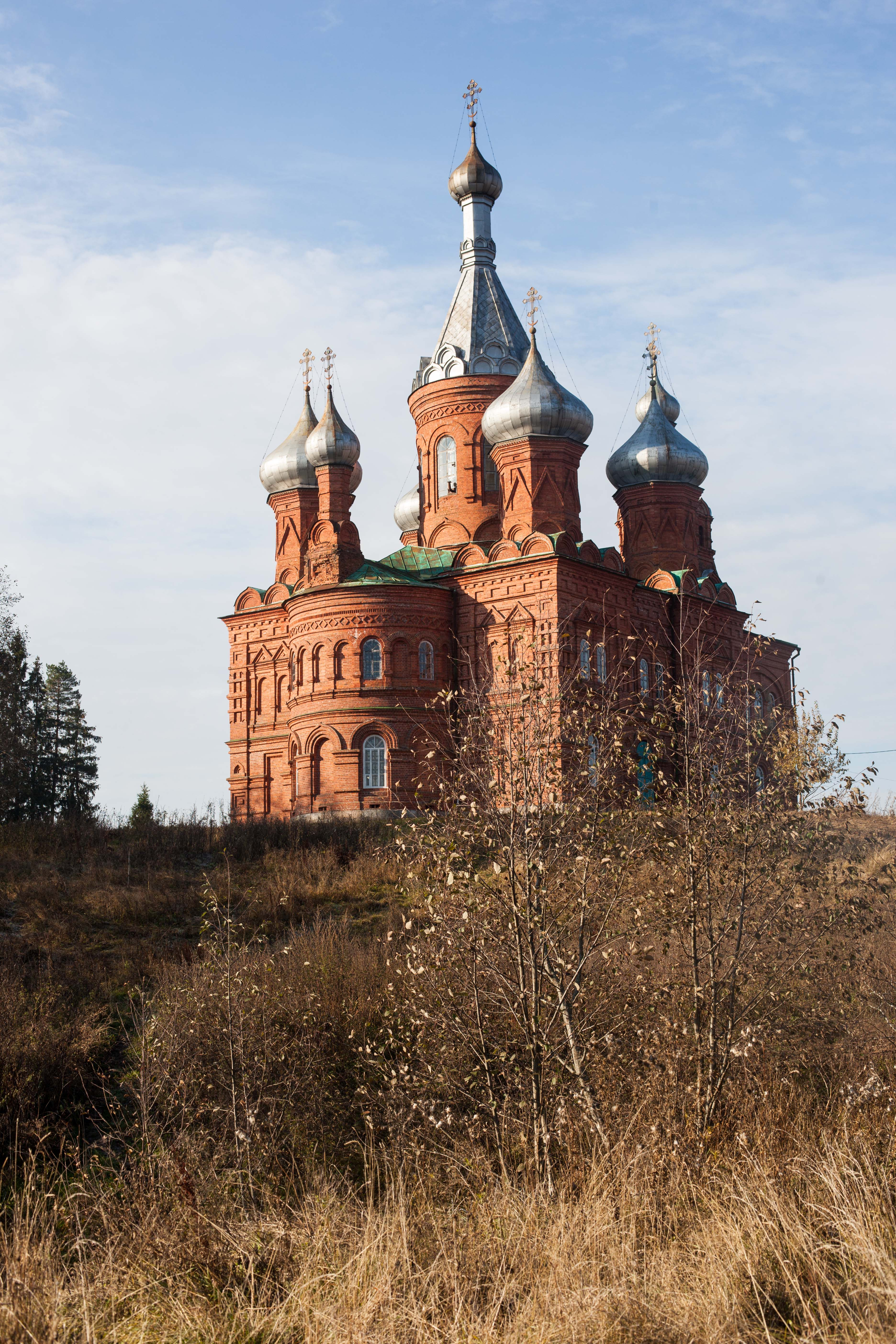 Монастырь Ольгин (Тверская область, Андреаполь, село Волго-Верховье)